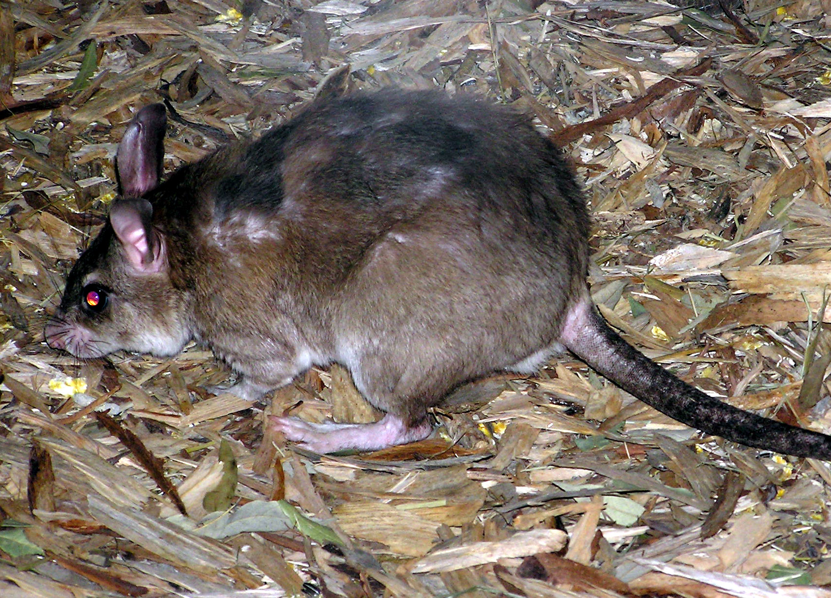 Malagasy giant rat Hypogeomys antimena at Bristol Zoo, England.